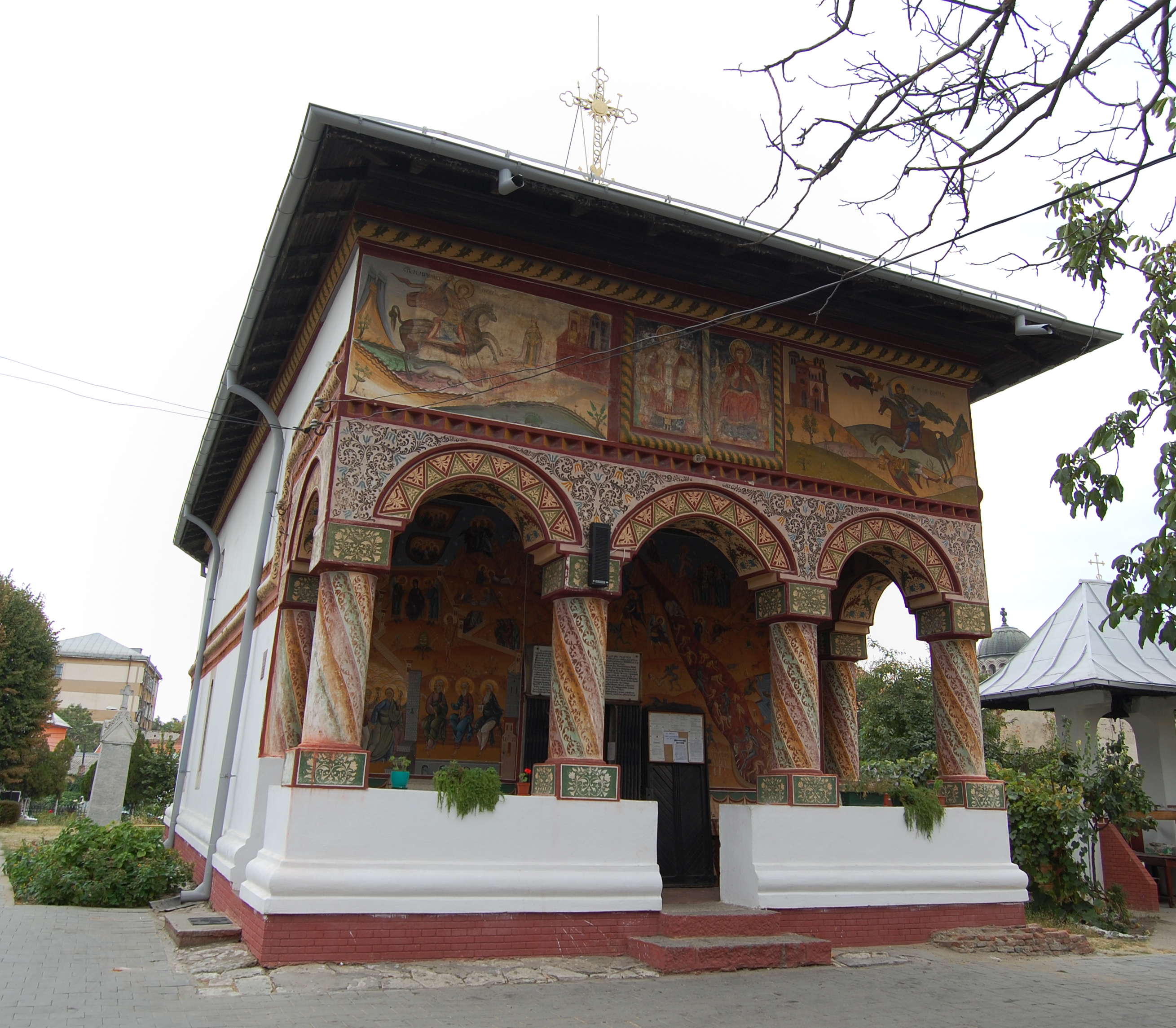 Biserica "Sf. Nicolae", "Sf. Paraschiva" - Brândușa